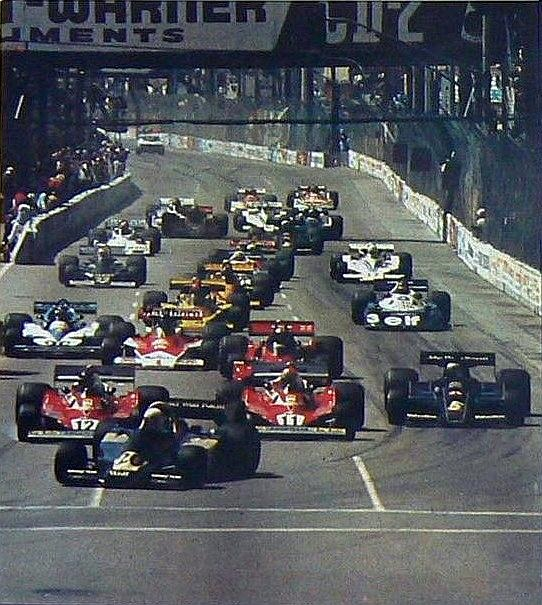 Départ du Grand Prix de Monaco 1977.